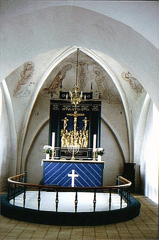 Lunde Kirke i Danmark. Kor, altertavle og kalkmalerier i hvælv